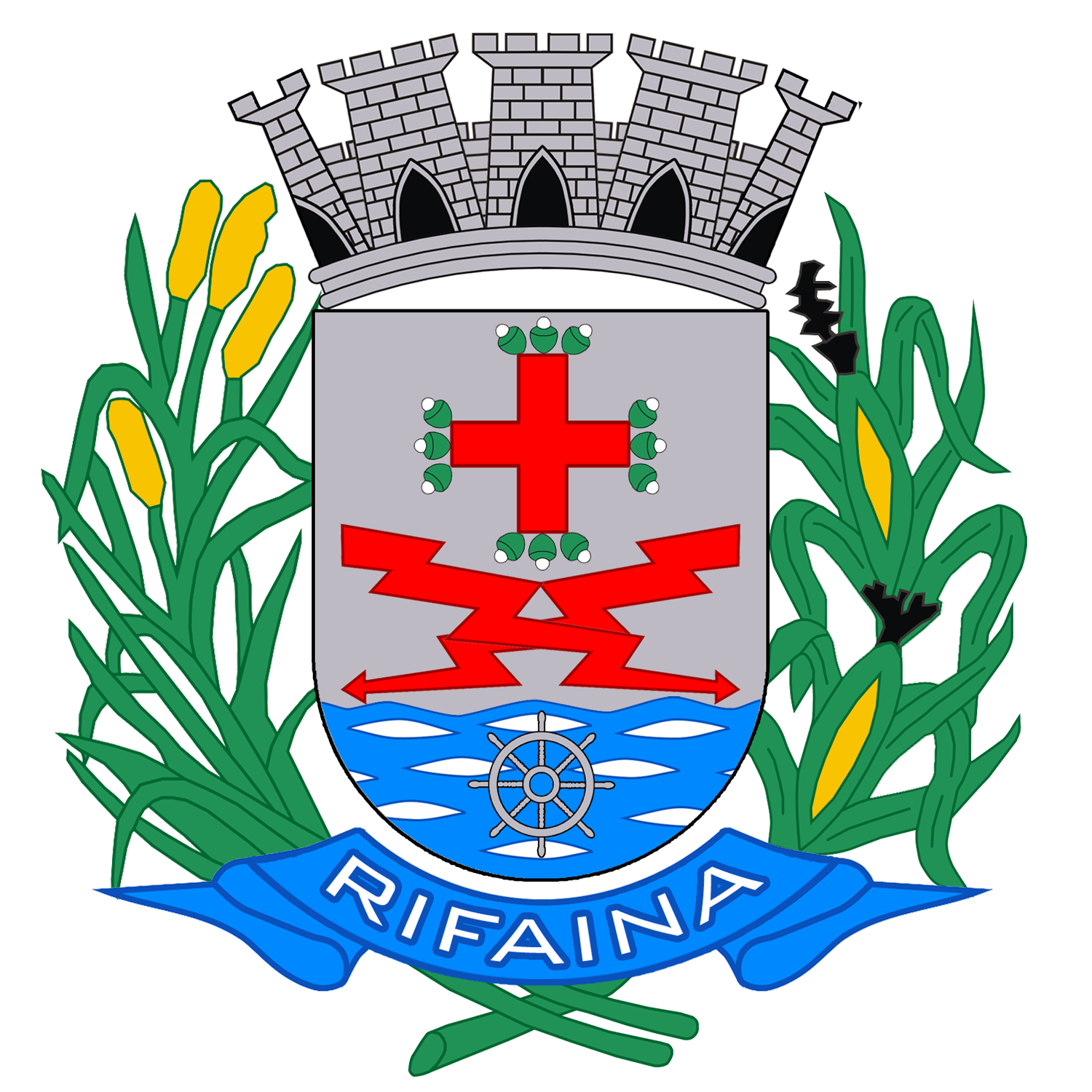 Brasão do Município de Rifaina - SP